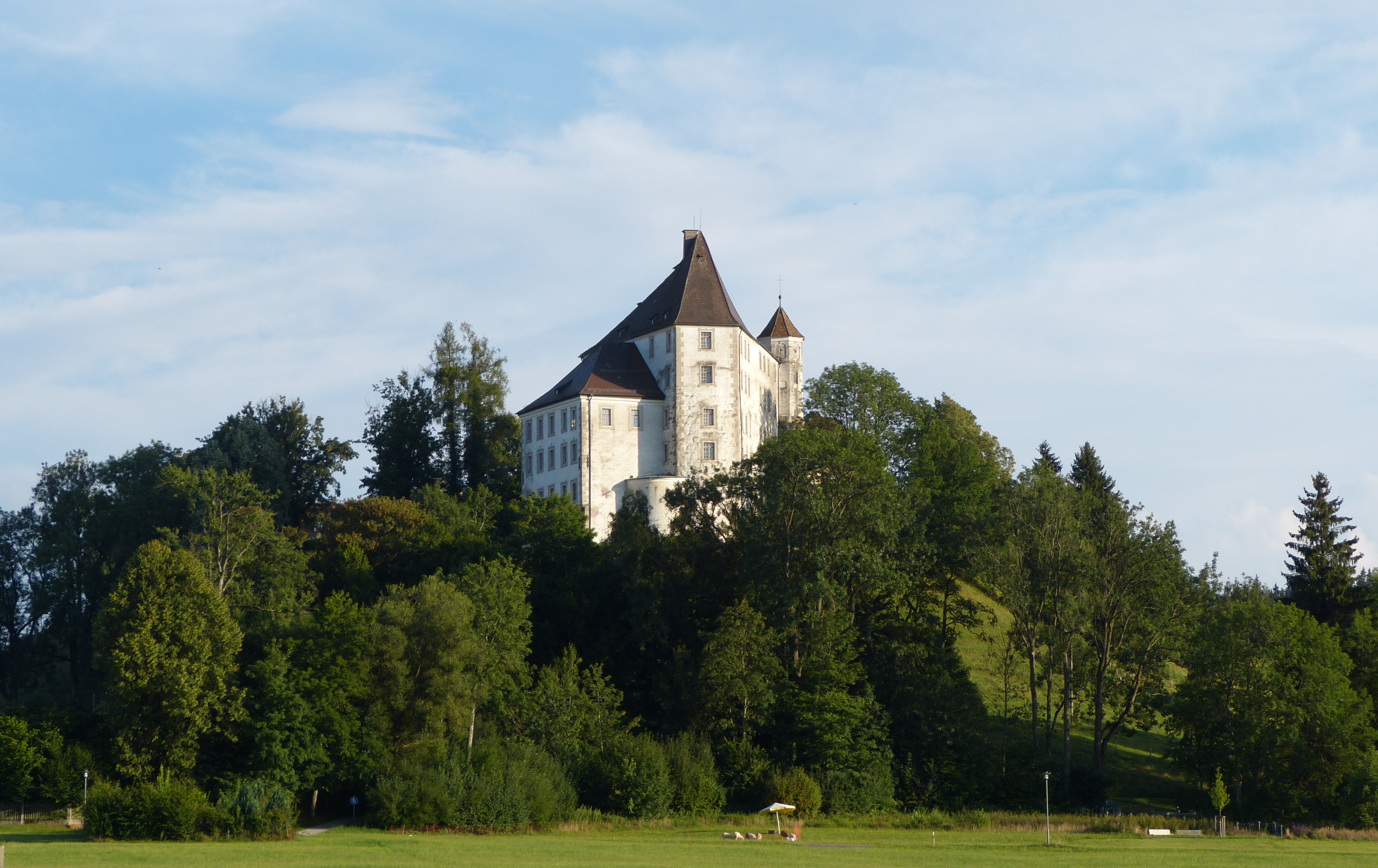 Hohes Schloss in Bad Grönenbach, Landkreis Unterallgäu, Bayern